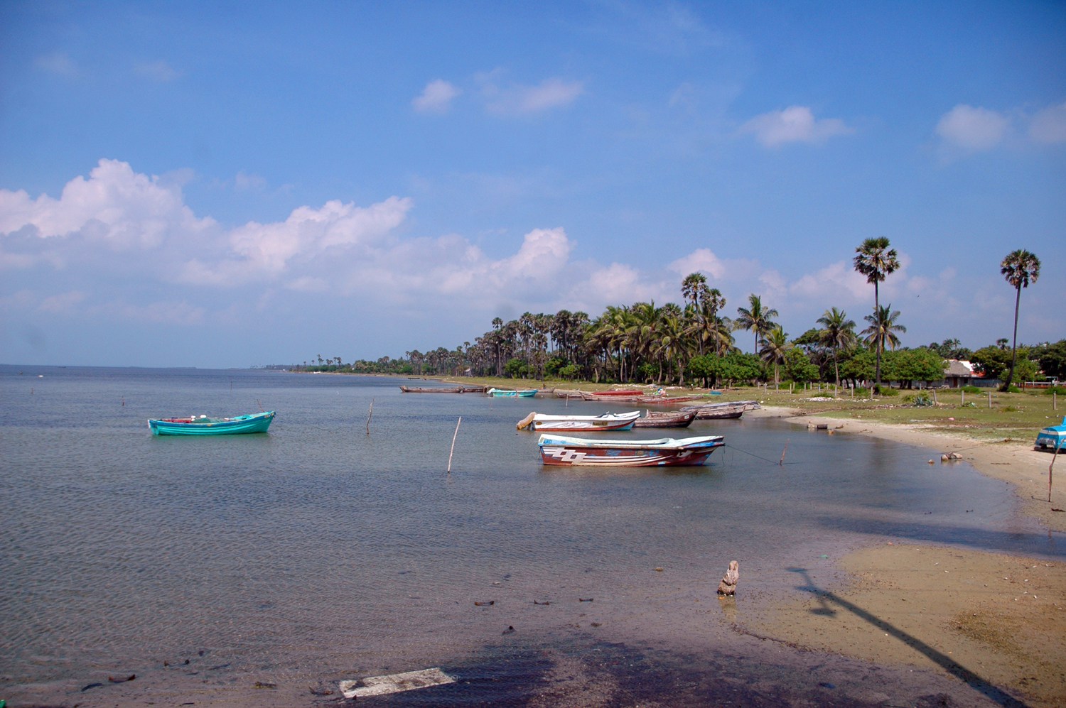 வேலனை கடற்கரை (யாழ்ப்பாணம்)